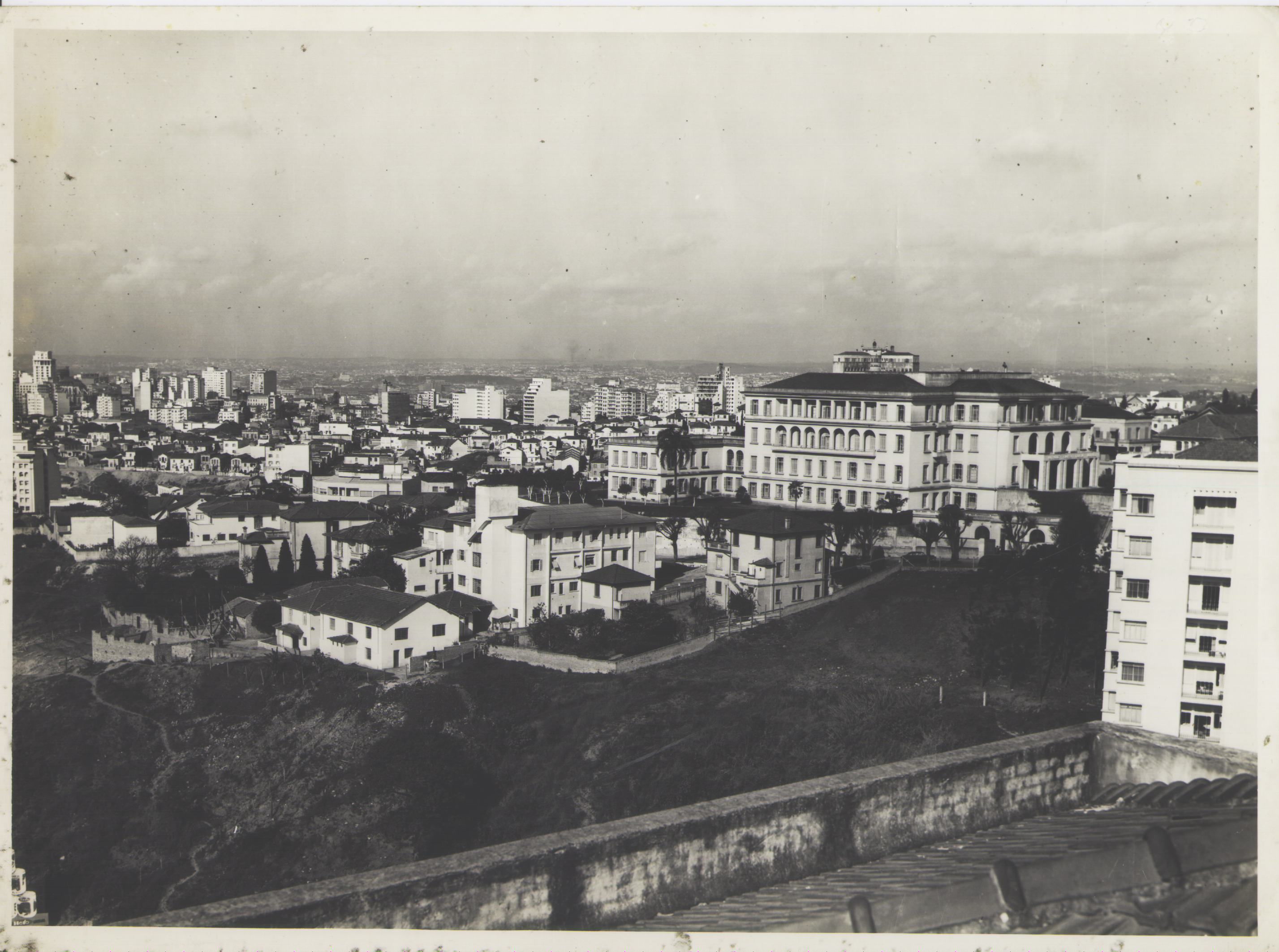 Obra que integra o acervo do Museu Paulista da USP. Coleção Werner Haberkorn